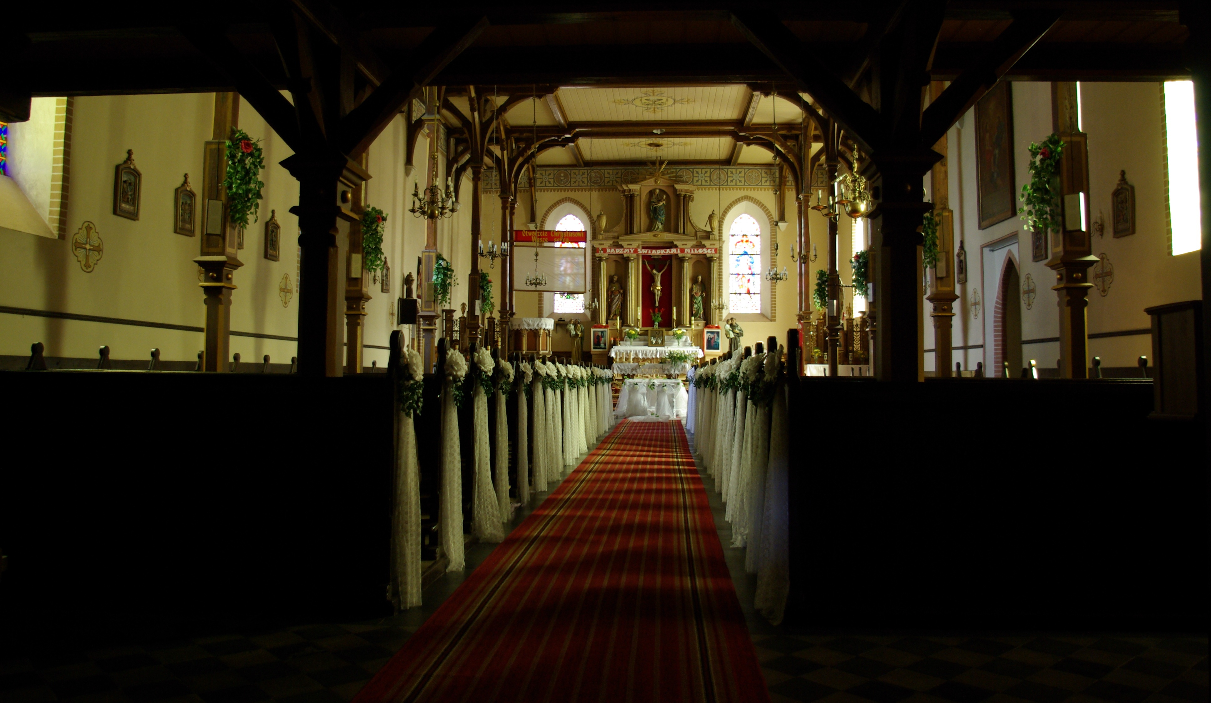 Srokowo